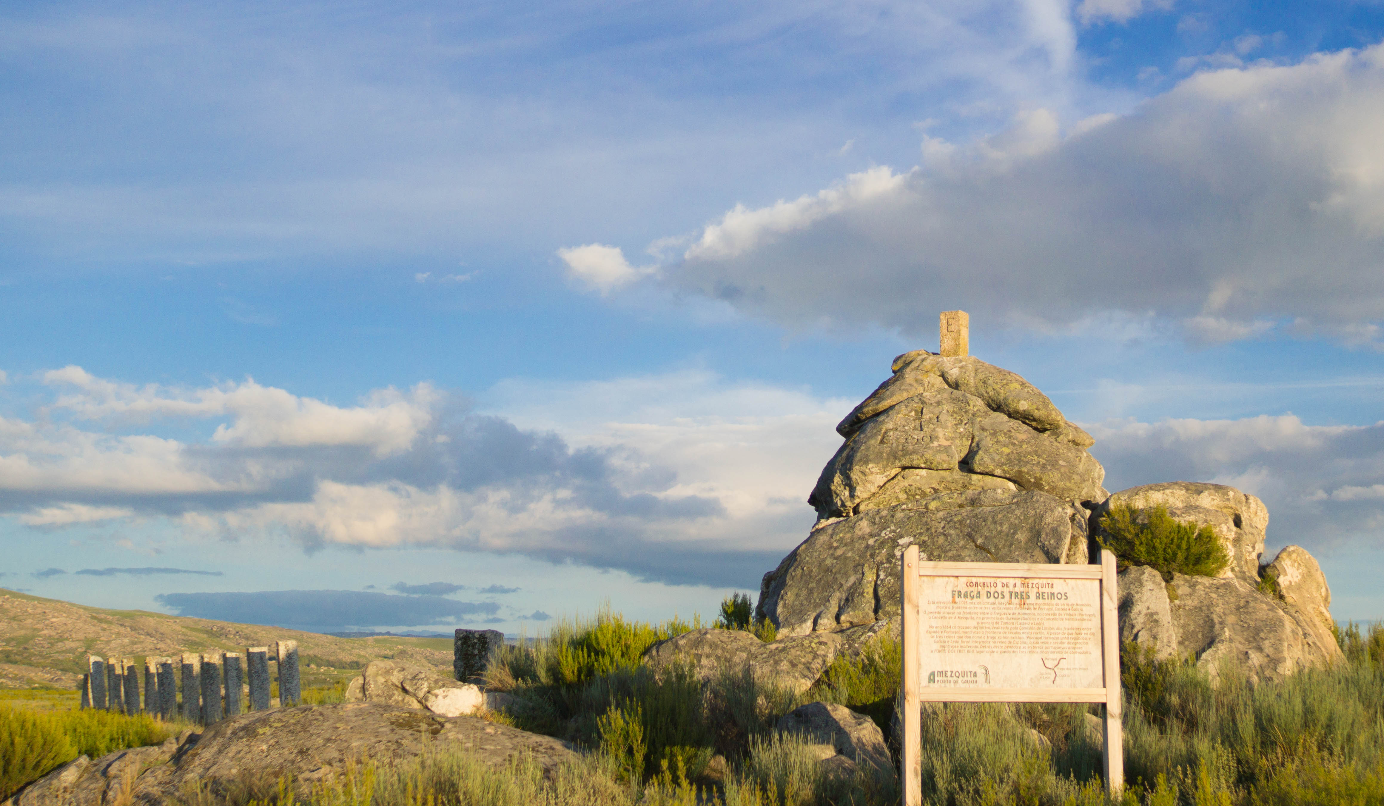 Fraga ou Penedo dos Tres Reinos, marca o punto de separación dos antigos reinos de Galicia, Portugal e León